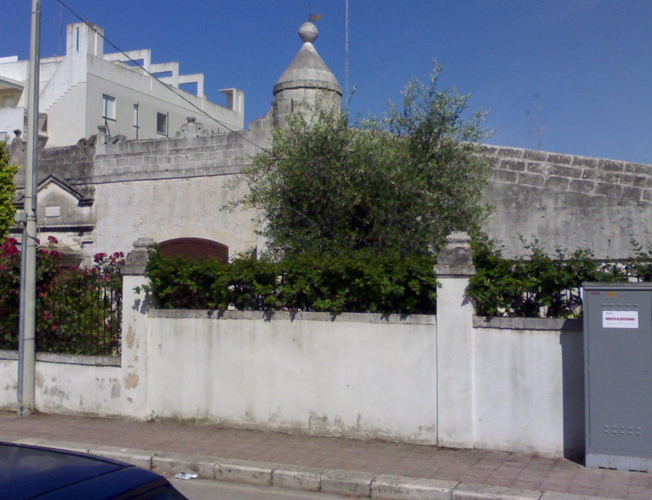 Facciata della villa Amari Cusa, sita nel quartiere Palese di Bari.